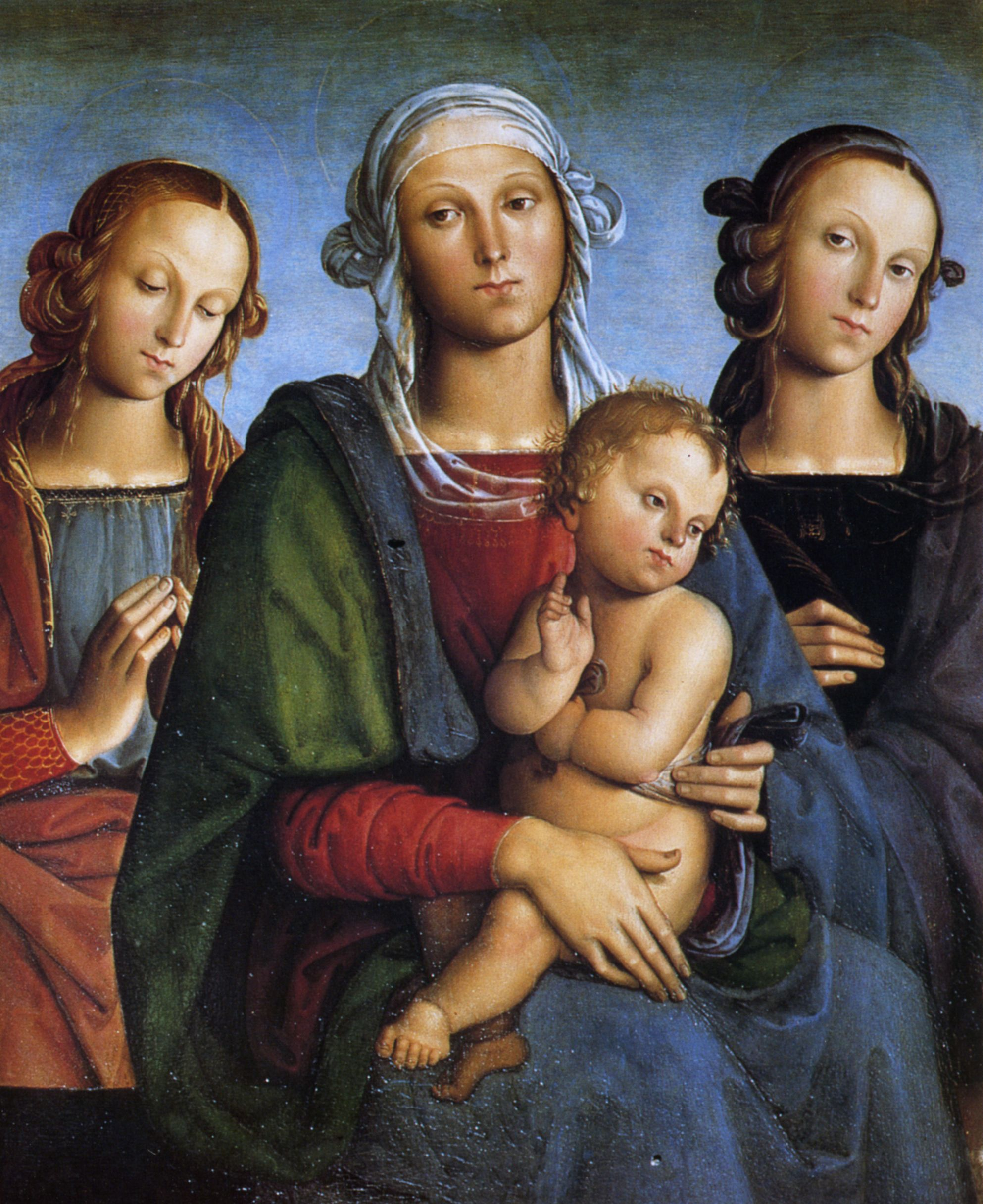 Pietro Perugino: Madonna col Bambino tra Santa Rosa (?) e Santa Caterina d’Alessandria. Cat. no. 36 in Vittoria Garibaldi: Perugino. Catalogo completo. Octavo, Firenze 2000, ISBN 88-8030-091-1